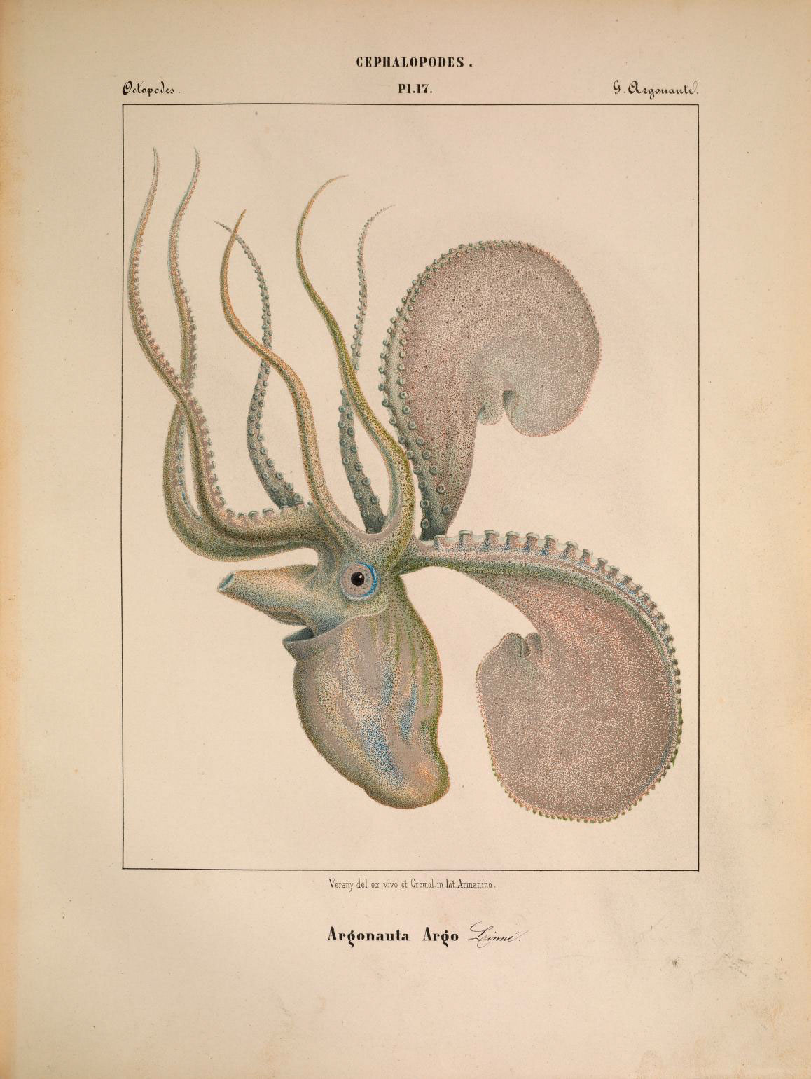 Argonauta argo